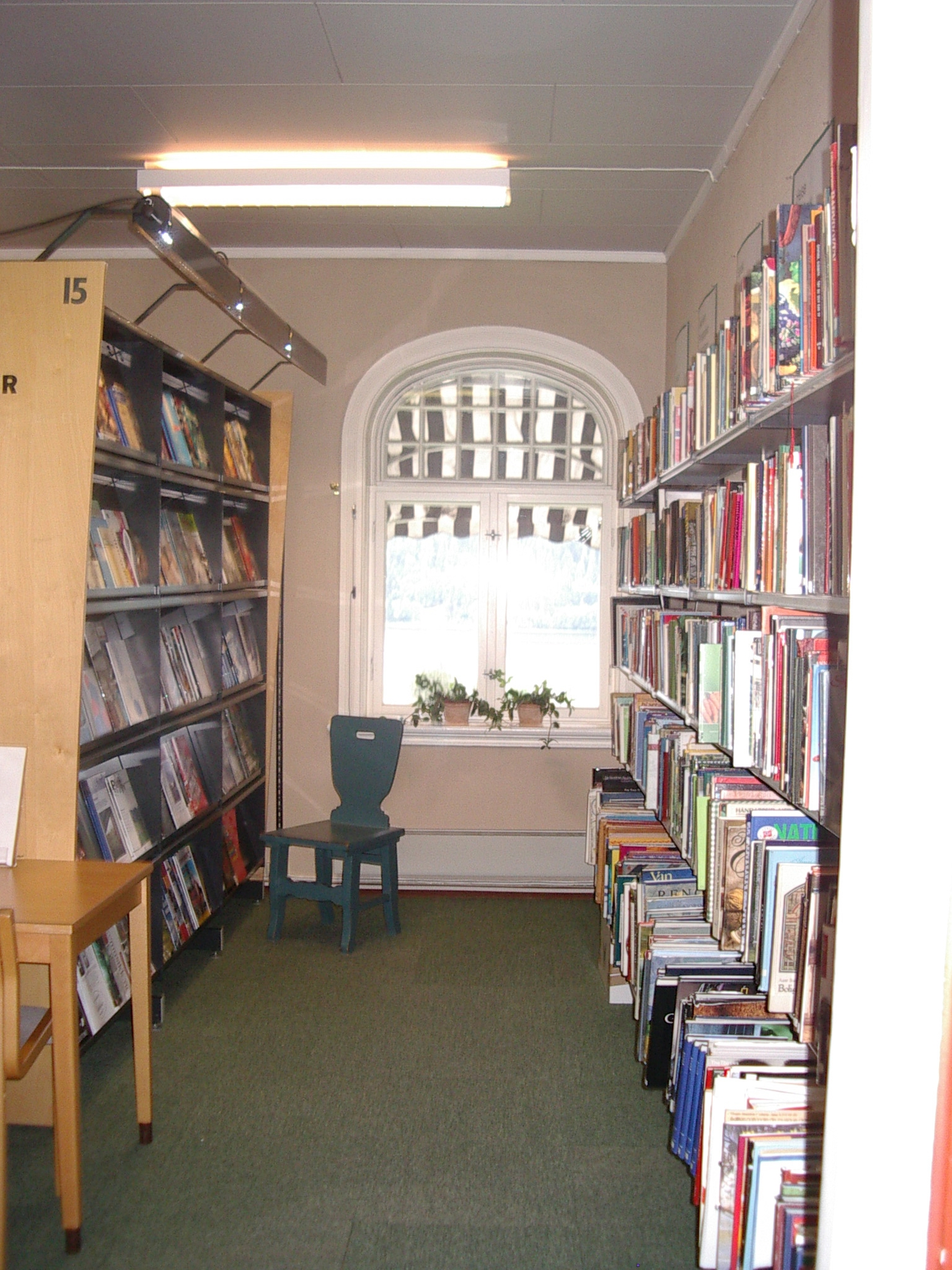 Kviteseid Folkebibliotek. Fra fagadelinga i 2.etg